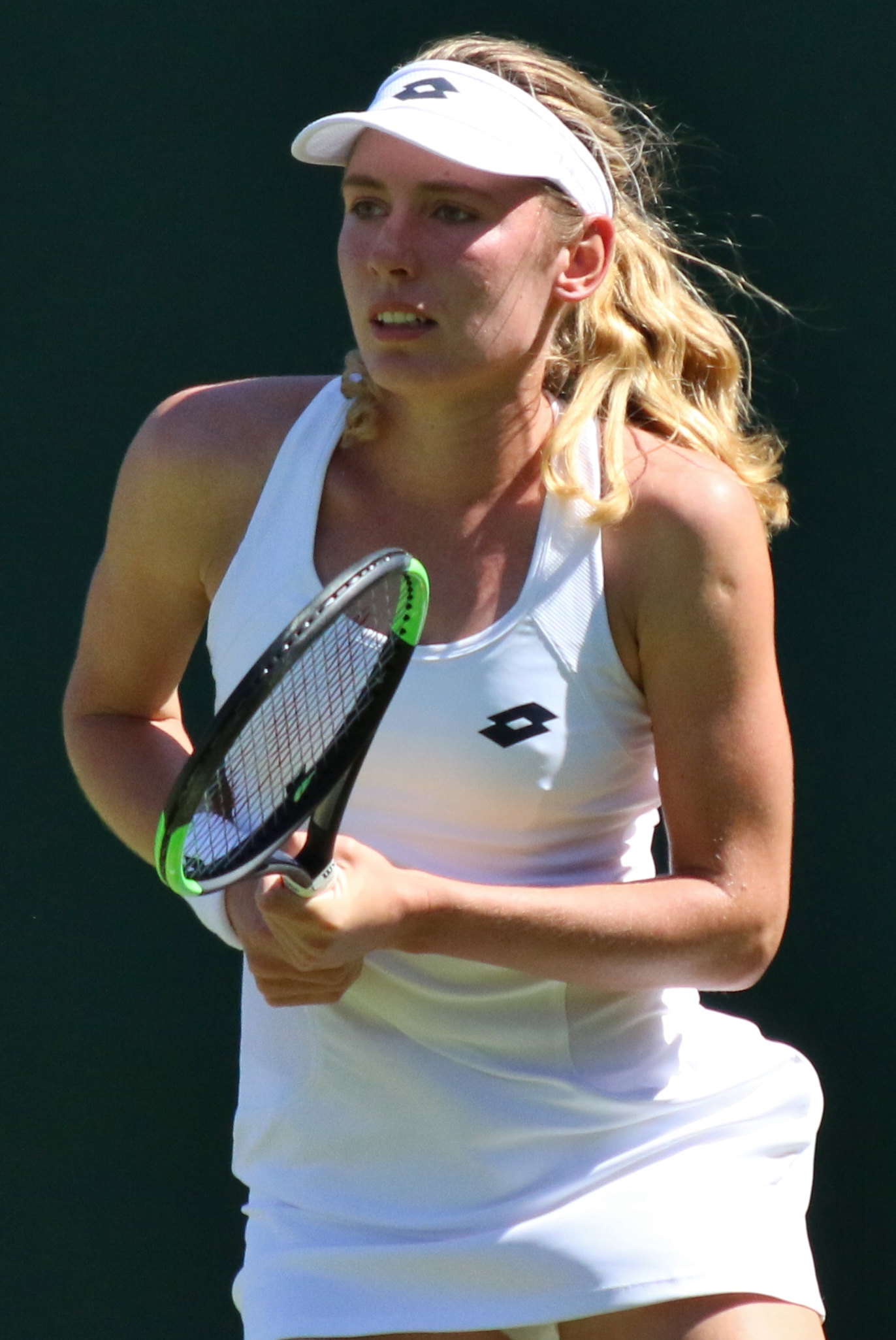 Alexandrova WM18 (47)